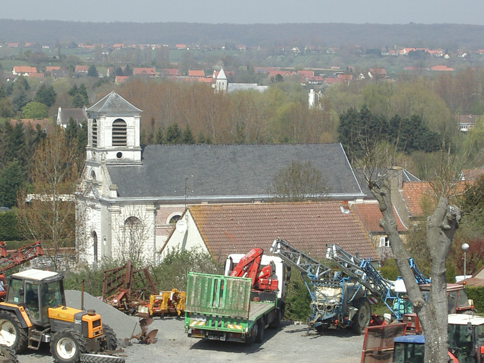 Vue sur l'église de Moulle (Pas-de-Calais, France).